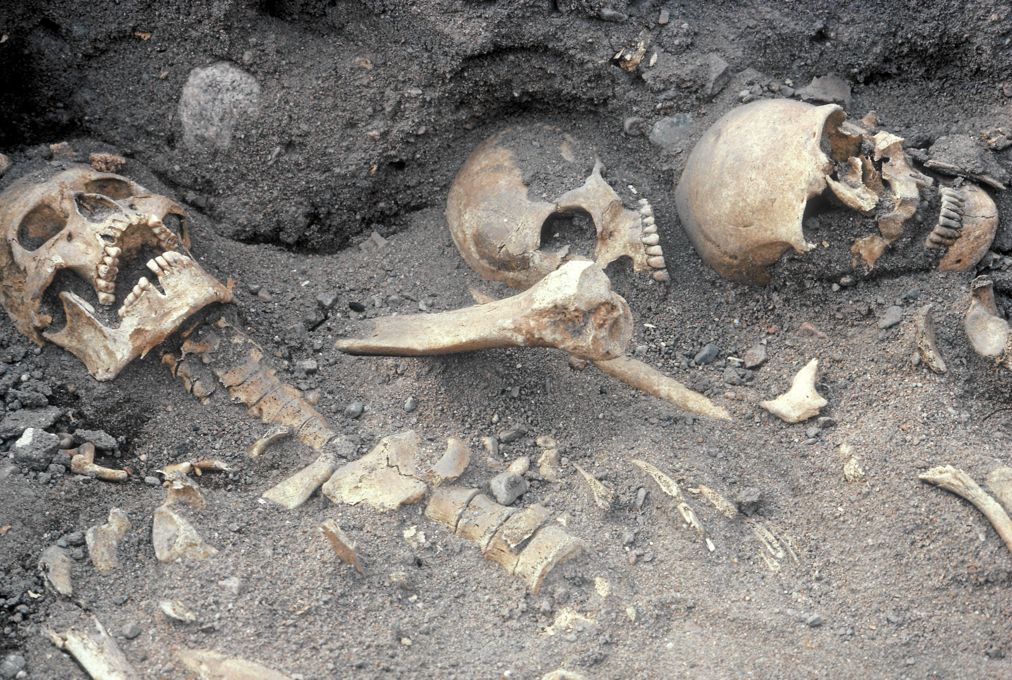 Skelett funna i Riksgropen